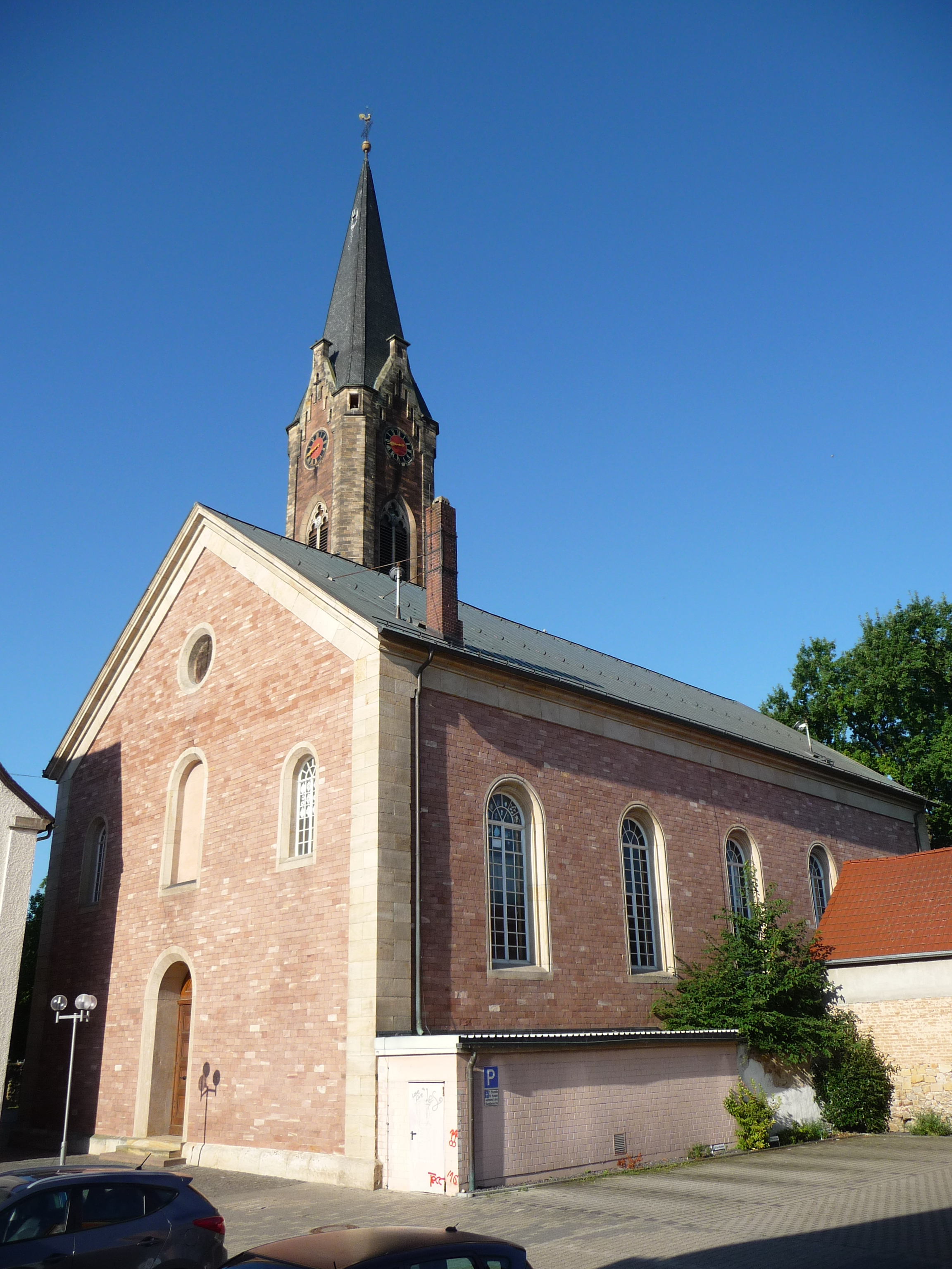 Evangelische Kirche (Lambsheim)